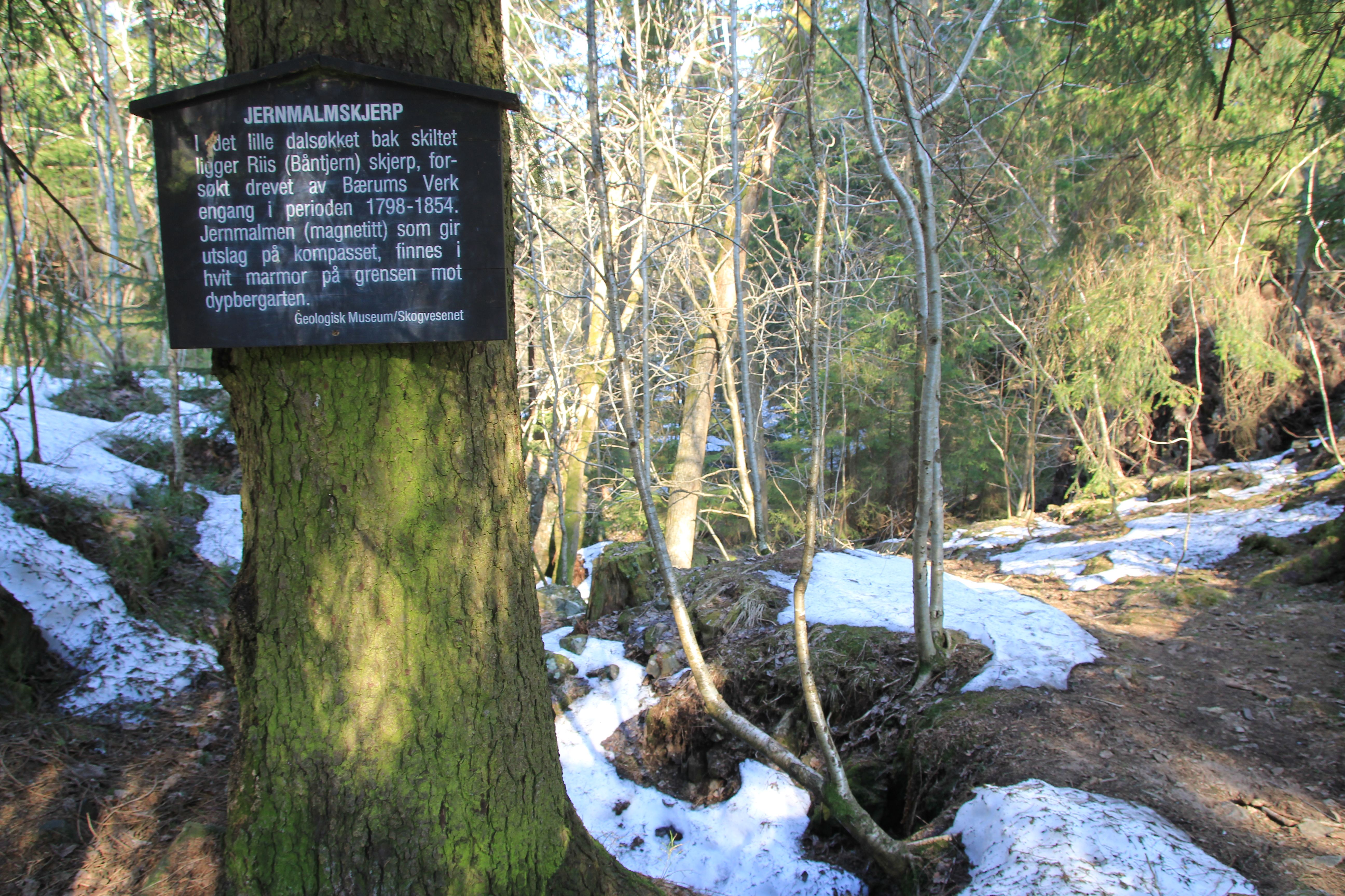 Riis skjerp, Vettakollen